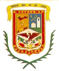 zacapoaxtla